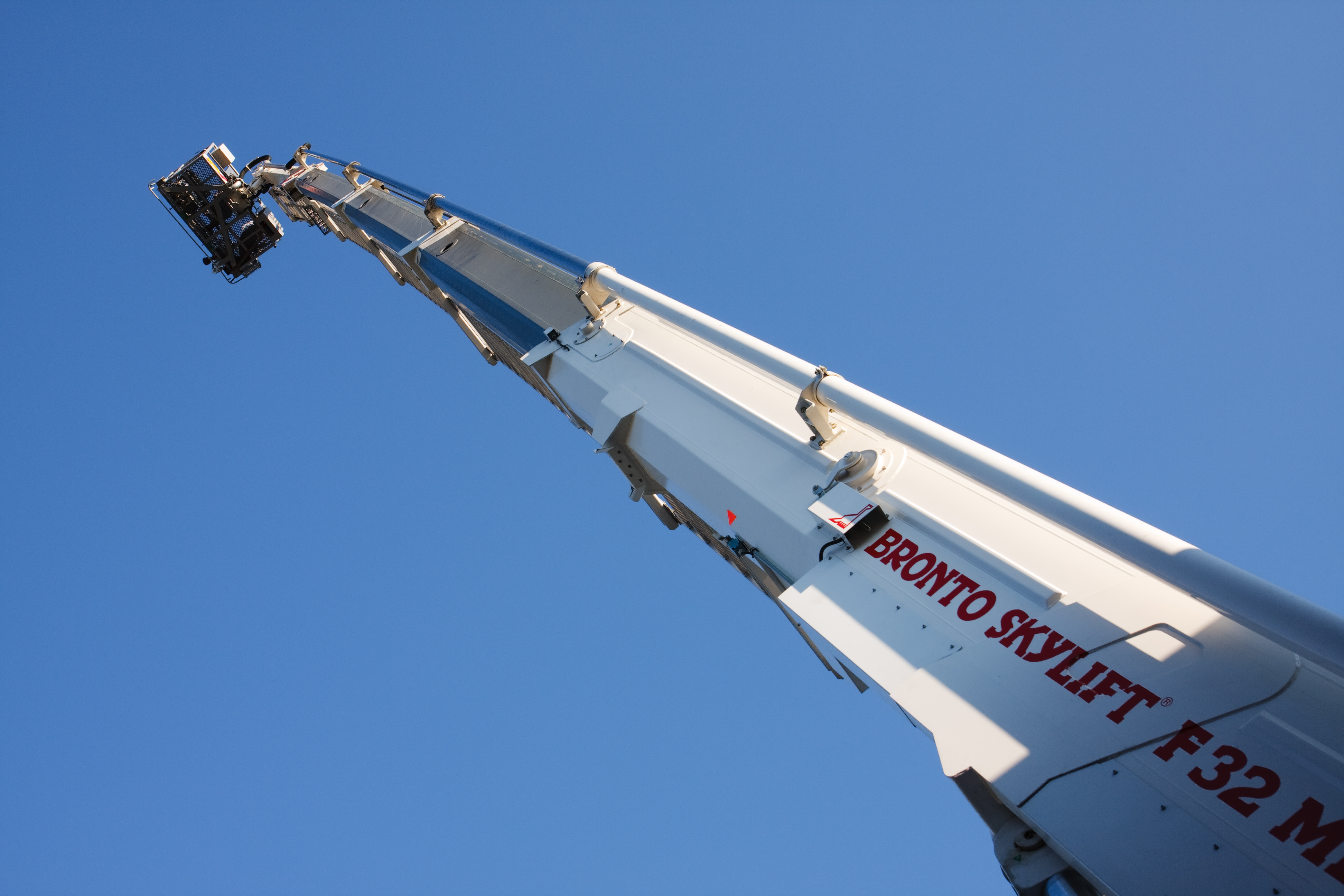 ausgefahrener Teleskoparm eines Bronto Skylift F32 MTD der Stützpunktfeuerwehr Buchs SG